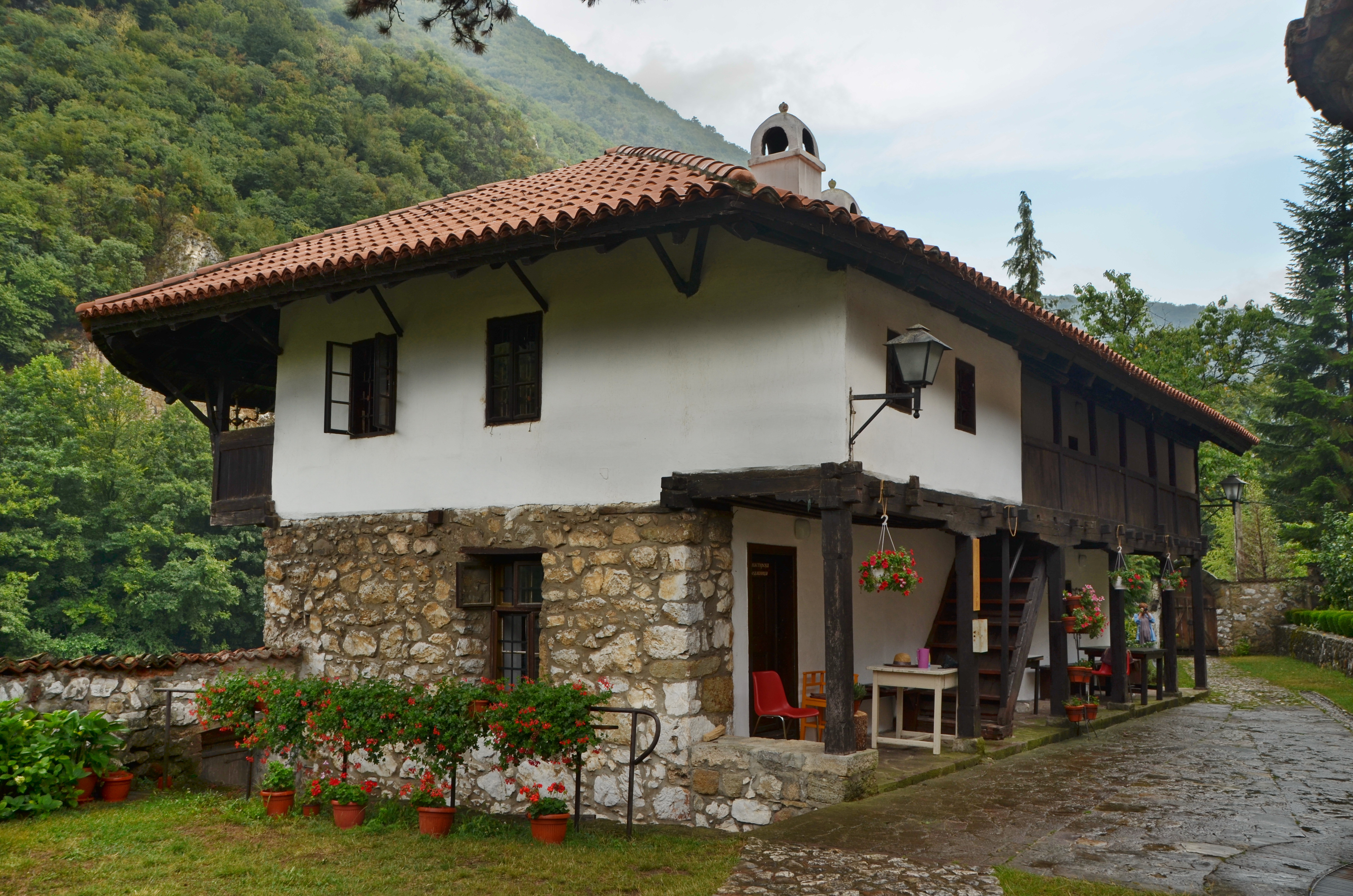 Манастир Никоље се налази у селу Рошци близу Овчар Бање, у Овчарско-кабларској клисури у подножју планине Каблар. Манастир Никоље је један од важнијих Овчарско-кабларских манастира - који се зову и Српска Света Гора.